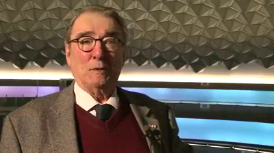 leo de Bever in 2013 tijdens bekendmaking van de lijst potentiele rijksmonumenten waaronder Evoluon.